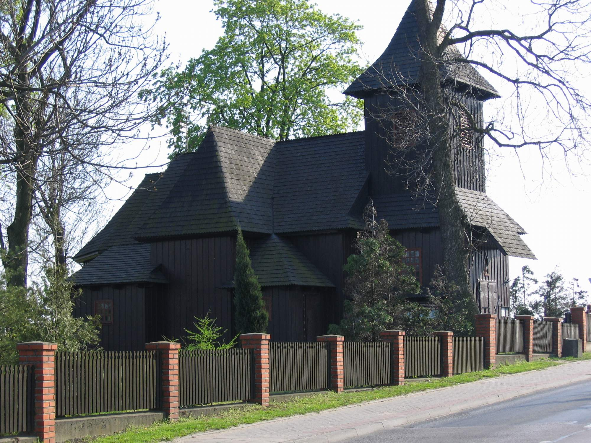 Kościół pod wezwaniem Św. Leonarda, widok od ulicy Sienkiewicza, Słupca. (foto. Marcin Majdecki)